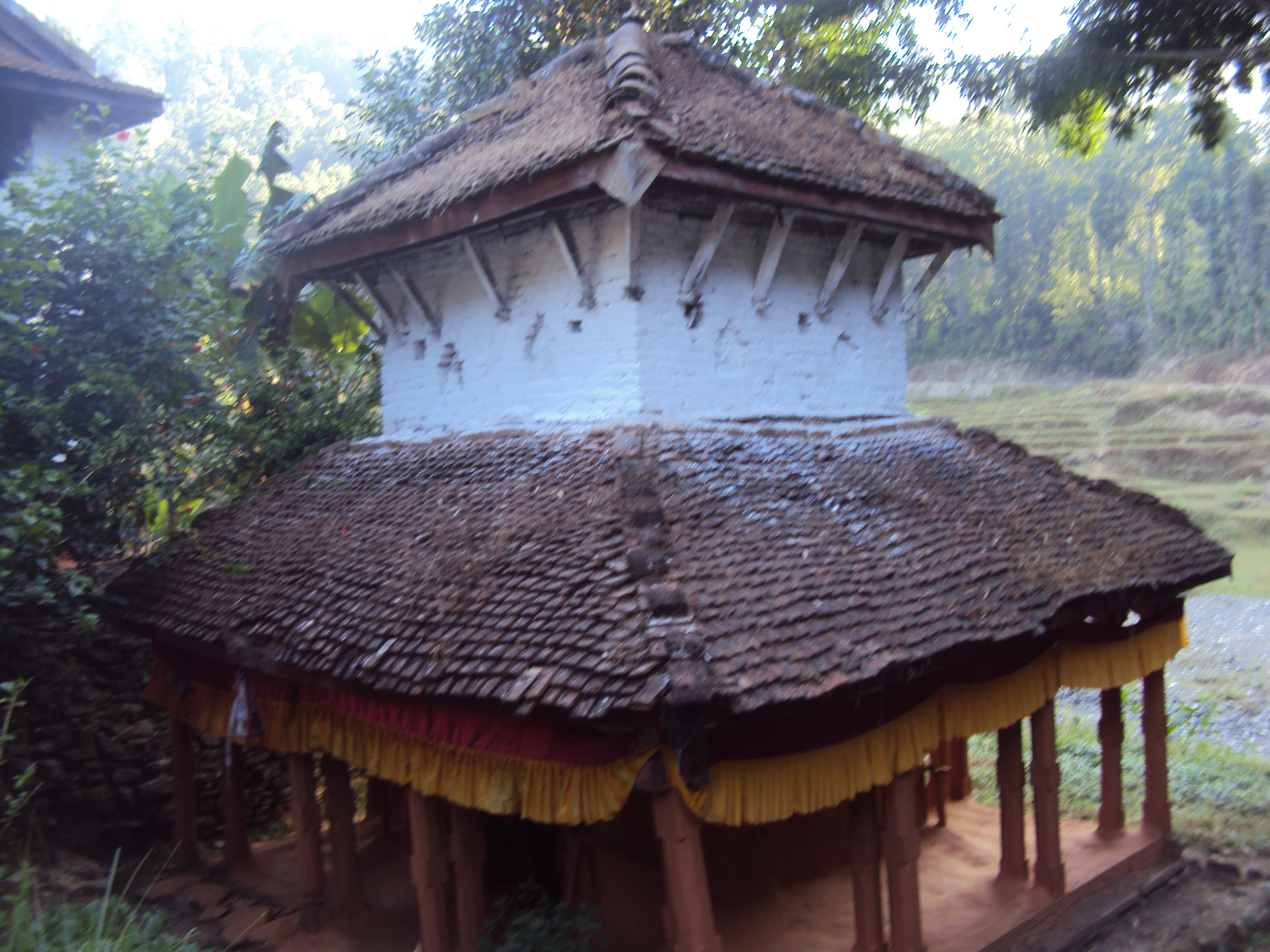 नेपाली: नाभिस्थान ज्वाला मन्दिर